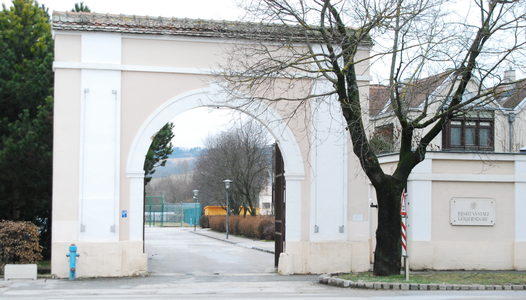 Portal der Justizanstalt Göllersdorf in Göllersdorf (Niederösterreich)